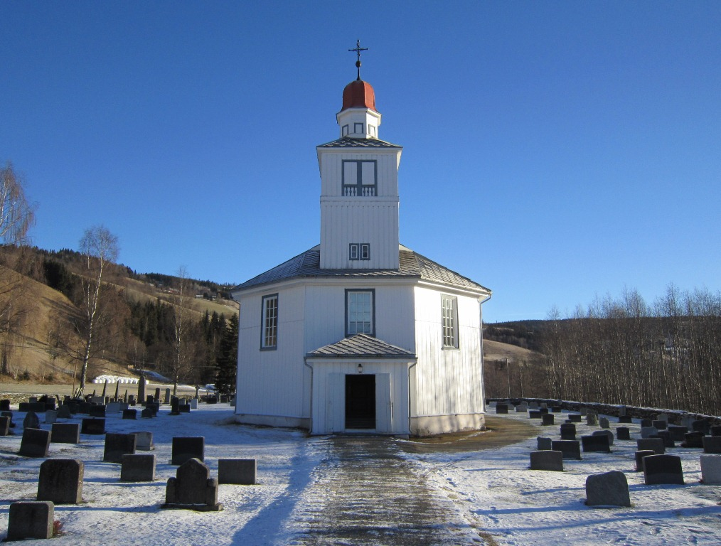 Svatsum kirke, Vestre Gausdal